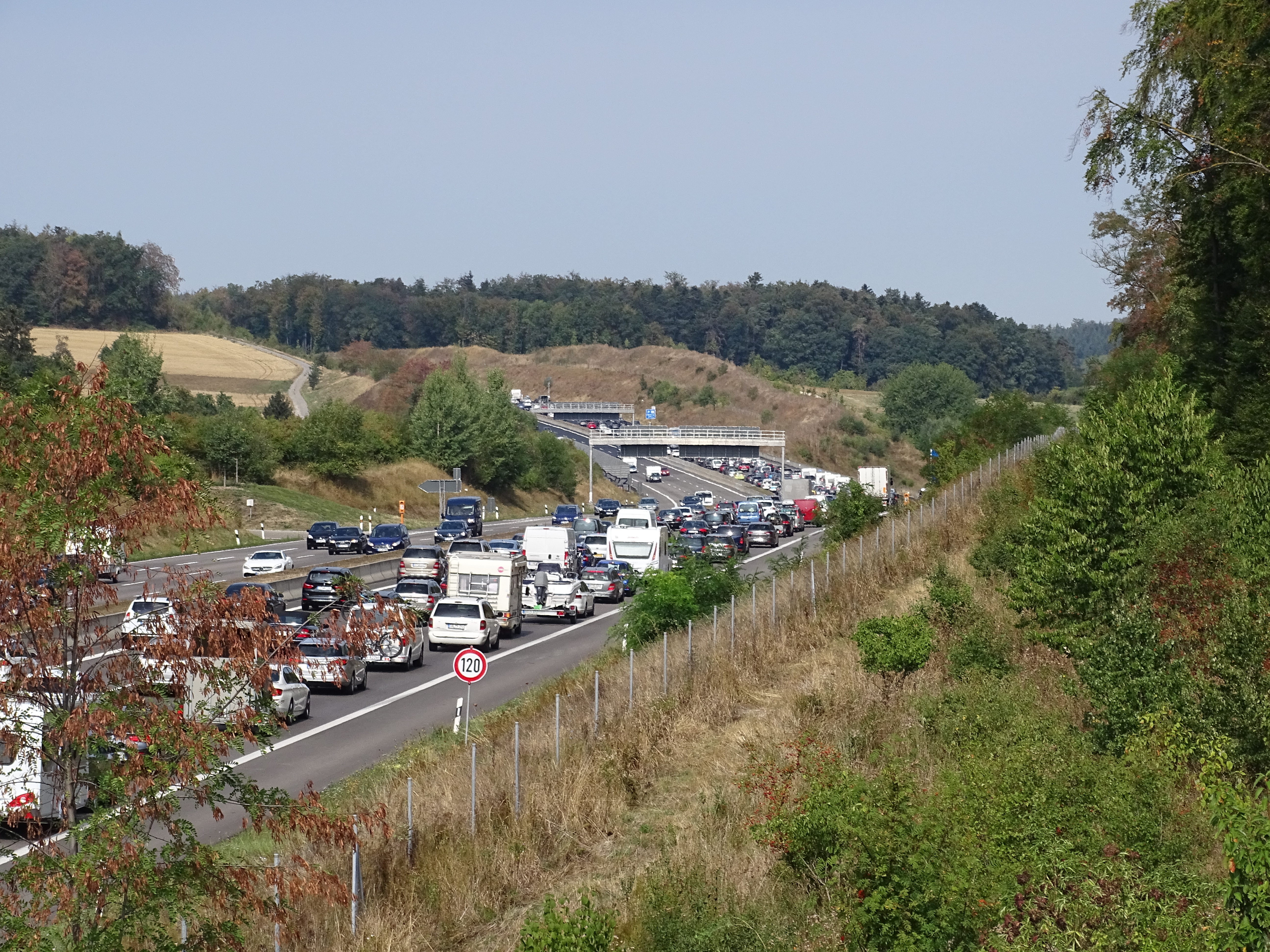 Stau auf der A8, Ausfahrt Rutesheim